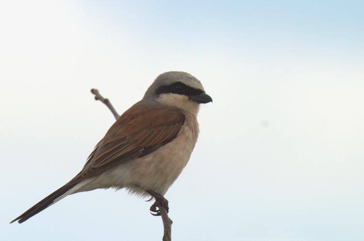 Lanius collurio in Poland